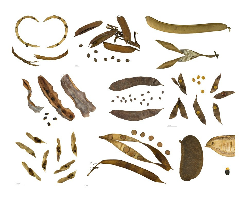 Gousse de différentes espèces de la famille des Fabaceae